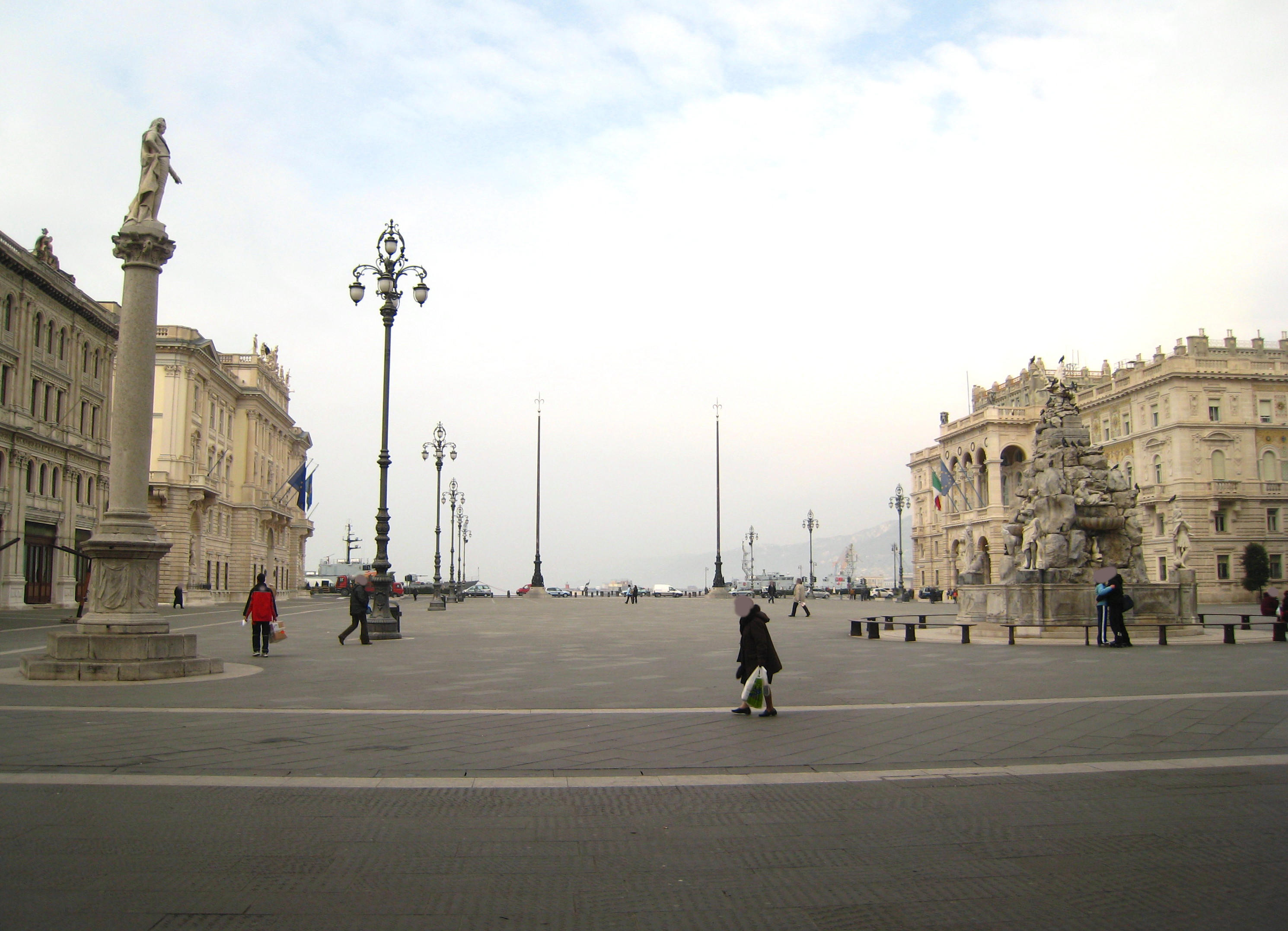 Piazza Unità - Trieste - Italy